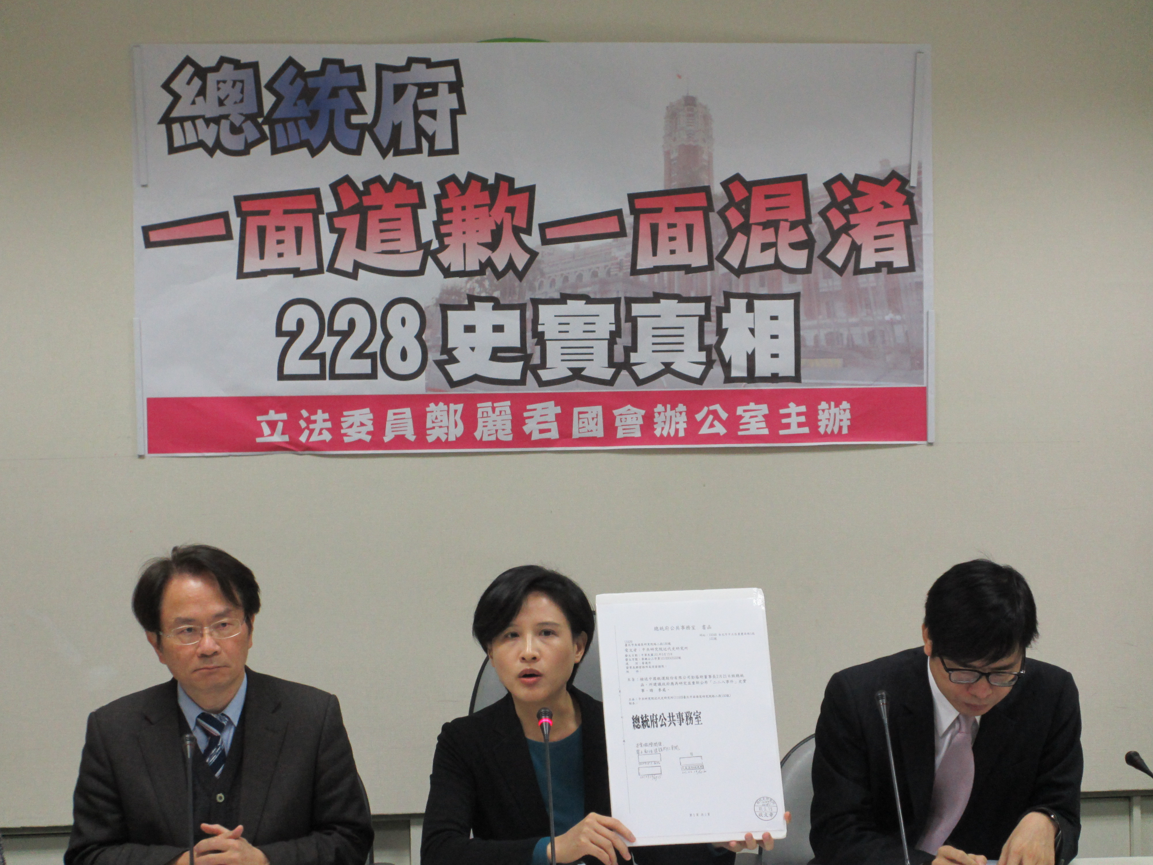 民主進步黨立法院黨團舉行記者會，批評總統府混淆二二八事件真相。左起：台灣二二八關懷總會理事長陳儀深、民主進步黨立法委員鄭麗君、民主進步黨立法委員陳其邁。